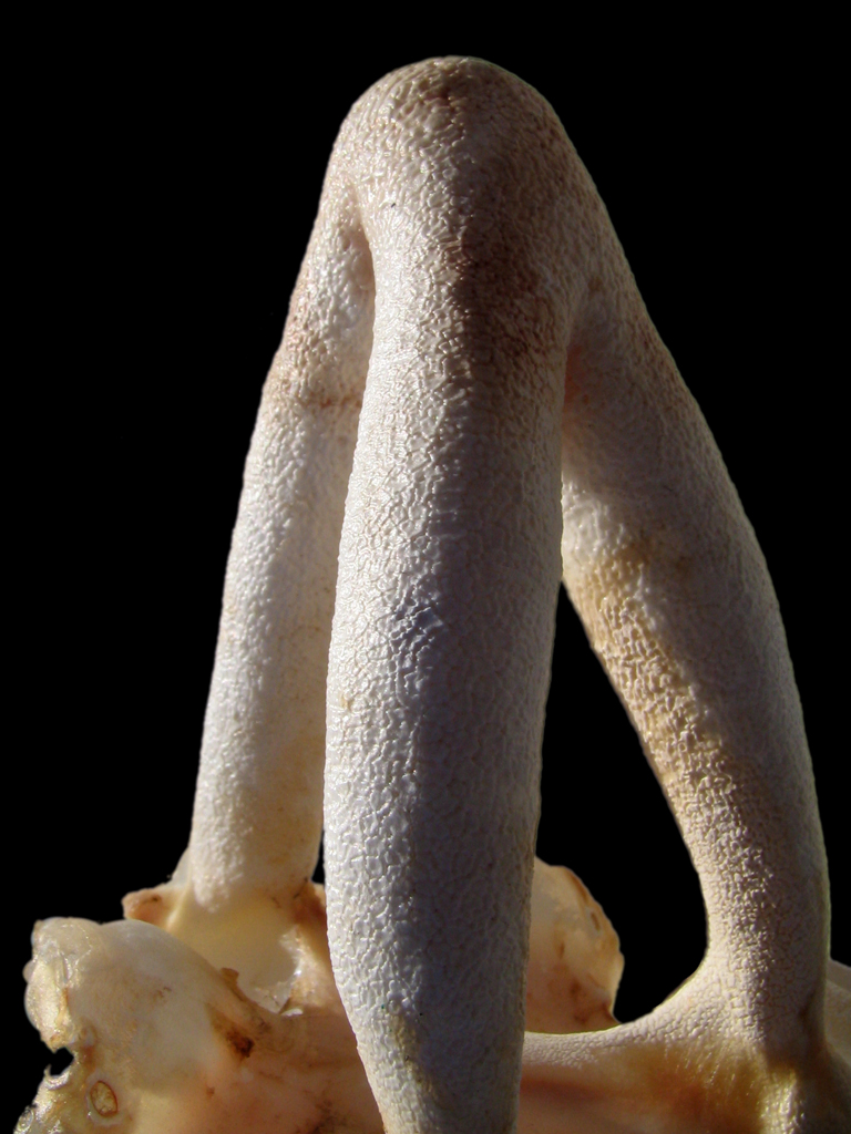 Squelette de rostre de requin-taupe (maraîche).(Lamna nasus)